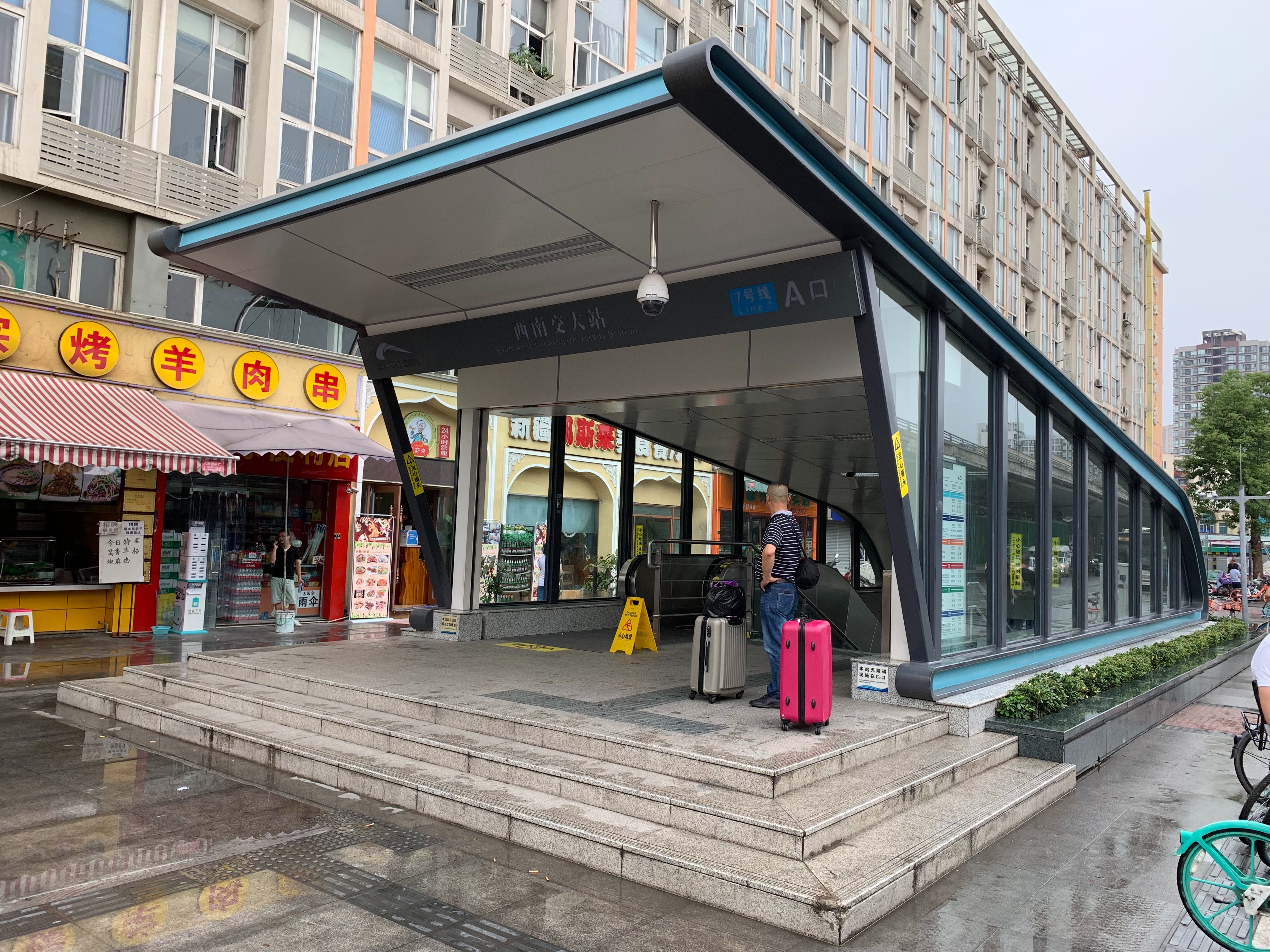 成都地铁西南交大站